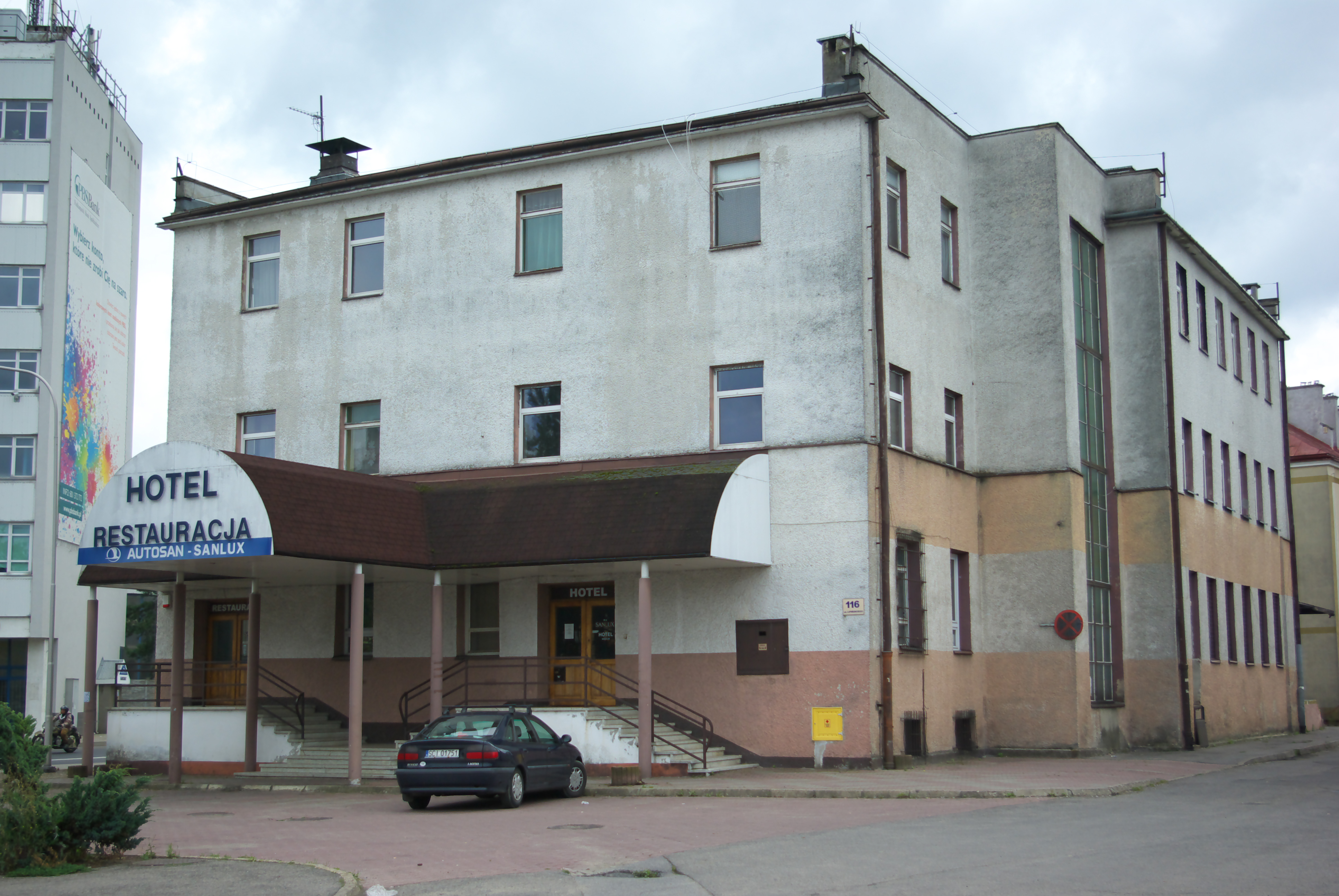 Hotel Sanlux przy ulicy Lipińskiego 116 w Sanoku